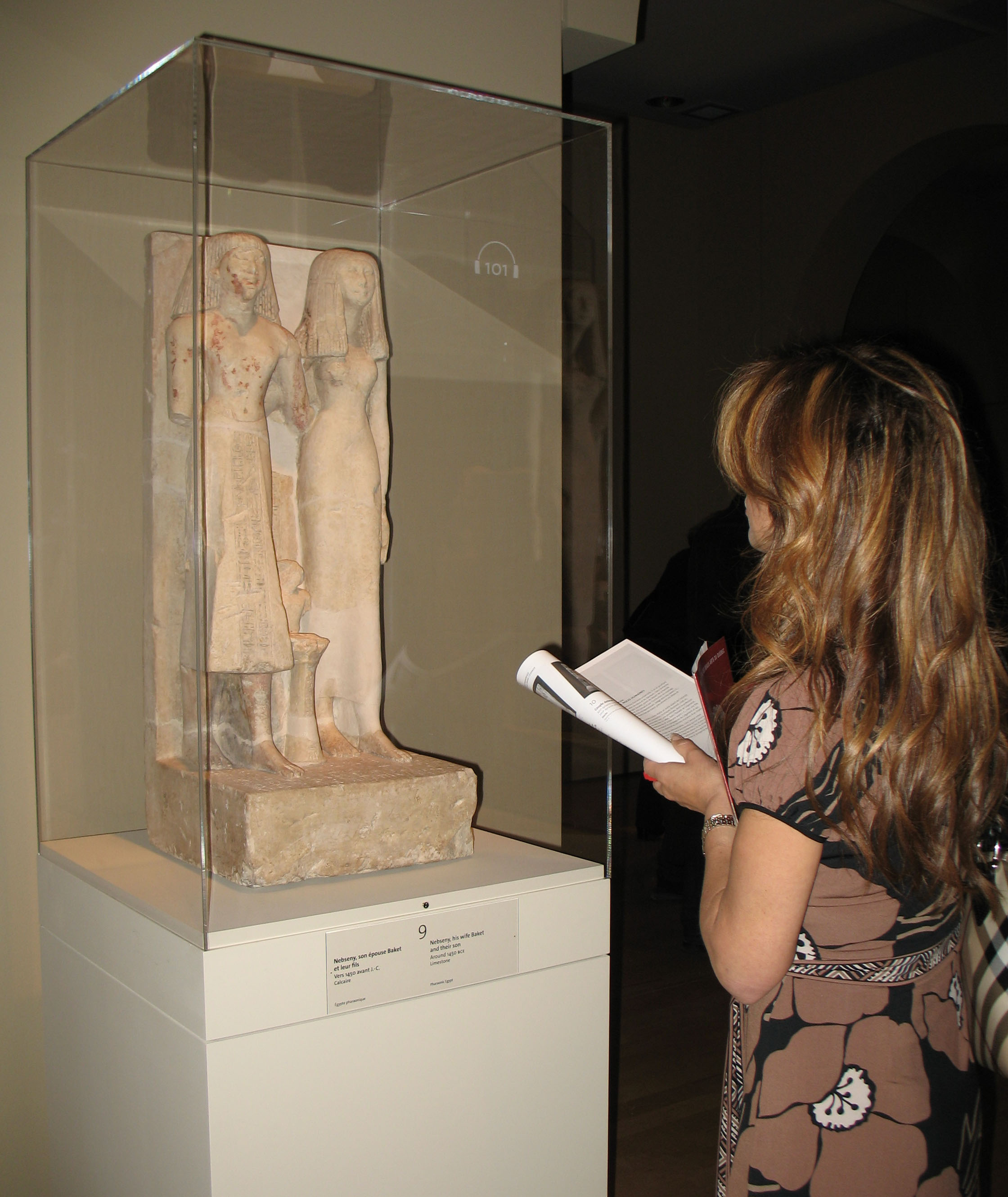 Nebséni, supérieur de l'étable royale, son épouse Baket et leur fils. (milieu 18e dynastie) E 11364.